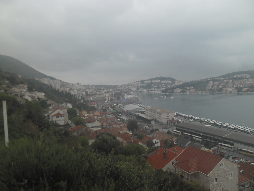 Susret hrvatske katoličke mladeži, Dubrovnik 26. travnja 2014.